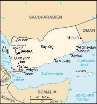 Bestehende Wiki-Jemen-Karte mit Hervorhebung der Stadt Mokka. CIA World Factbook